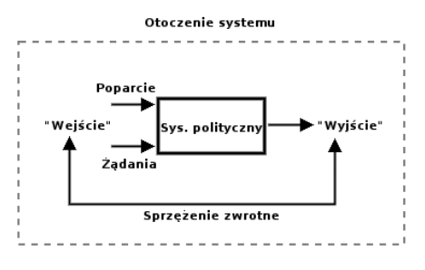 System polityczny wg Eastona